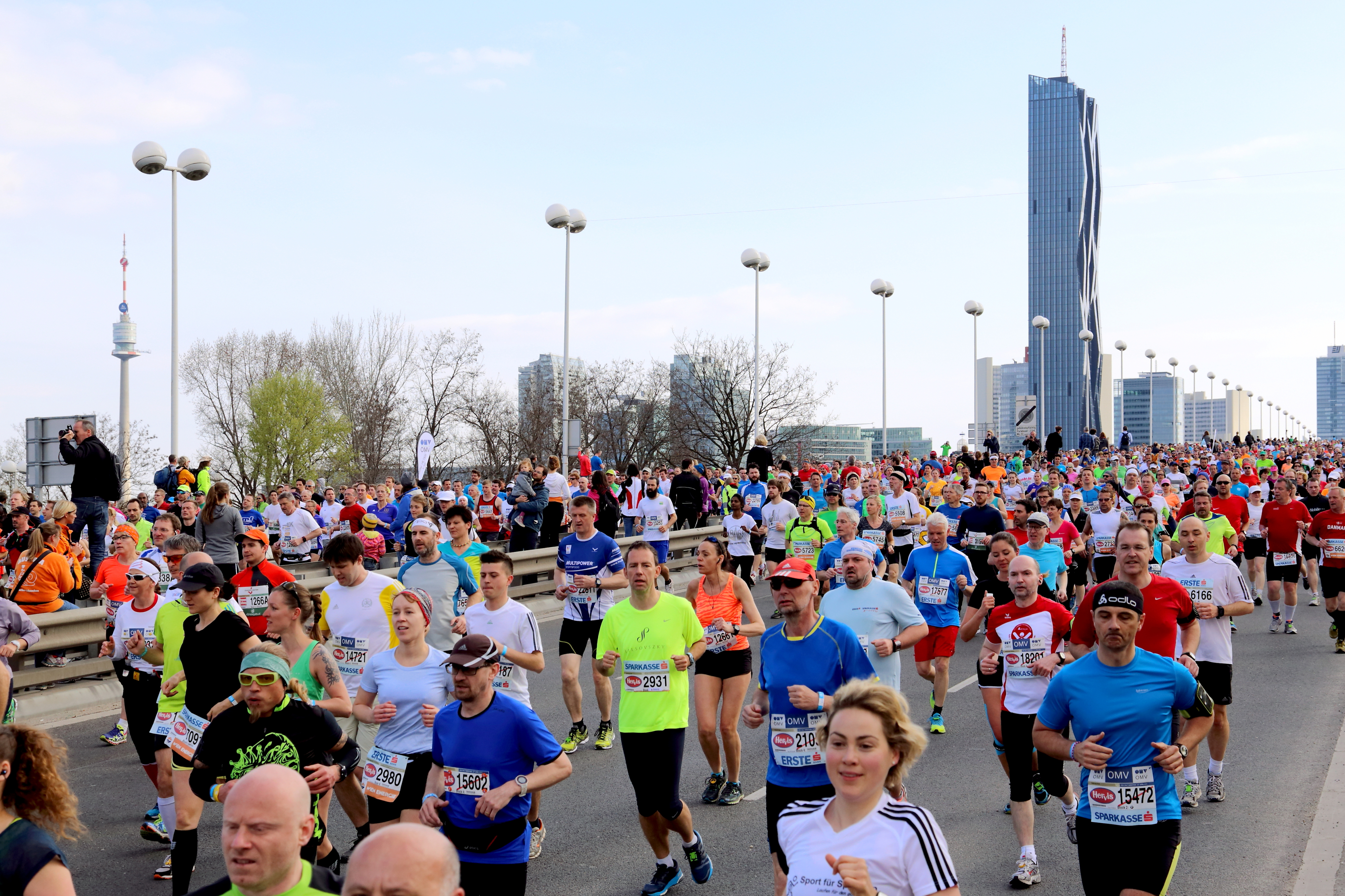 Läufer des 32. Vienna City Marathon im Bereich Reichsbrücke mit dem DC Towers im Hintergrund. Insgesamt gab es 42.742 Anmeldungen aus 129 Nationen (Marathon 9.064, OMV Halbmarathon 16.145, Stadion Center Staffel Marathon 14.576 (=3.644 Teams), Coca-Cola 4.2 1.580, Coca-Cola 2.0 1.377). Sieger wurde der Äthiopier Sisay Lemma mit einer Zeit von 2:07:31 Stunden.